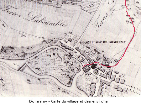 Domremy carte, Le ruisseau partageait Domrémy en deux. En noir, la maison de Jeanne d'Arc et les maisons voisines.